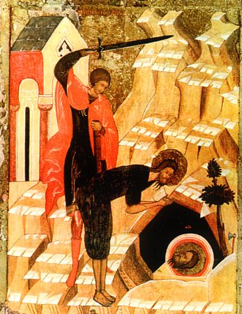 Execution of John the Baptistlabel QS:Len,"Execution of John the Baptist"label QS:Lru,"Усекновение головы Иоанна Предтечи. Русская икона северной школы. Киевский музей русского искусства"